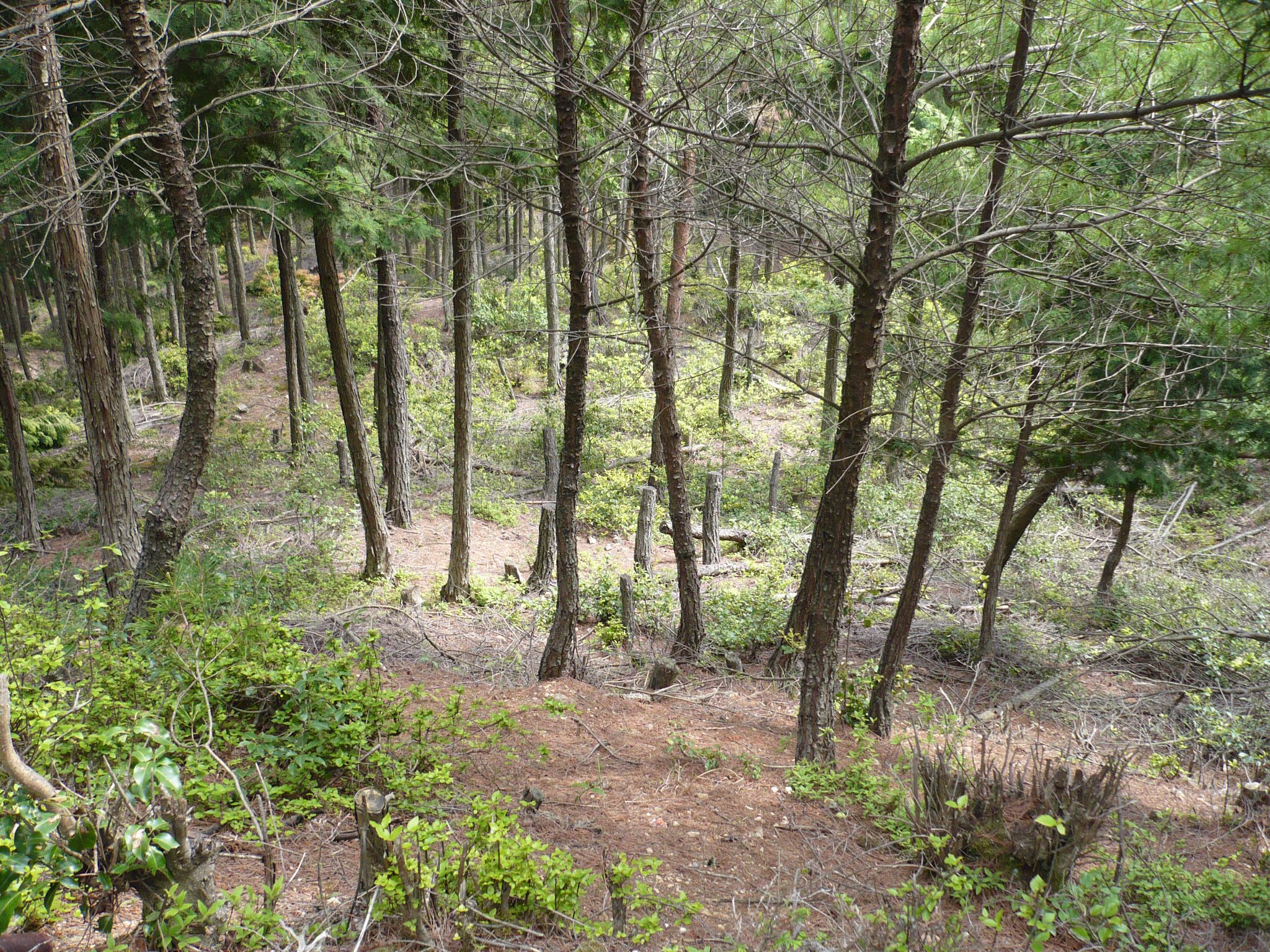 南側曲輪群